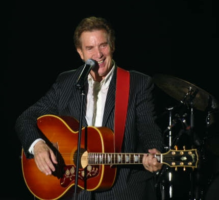 Flemish singer Will Tura performing live in Blankenberge.